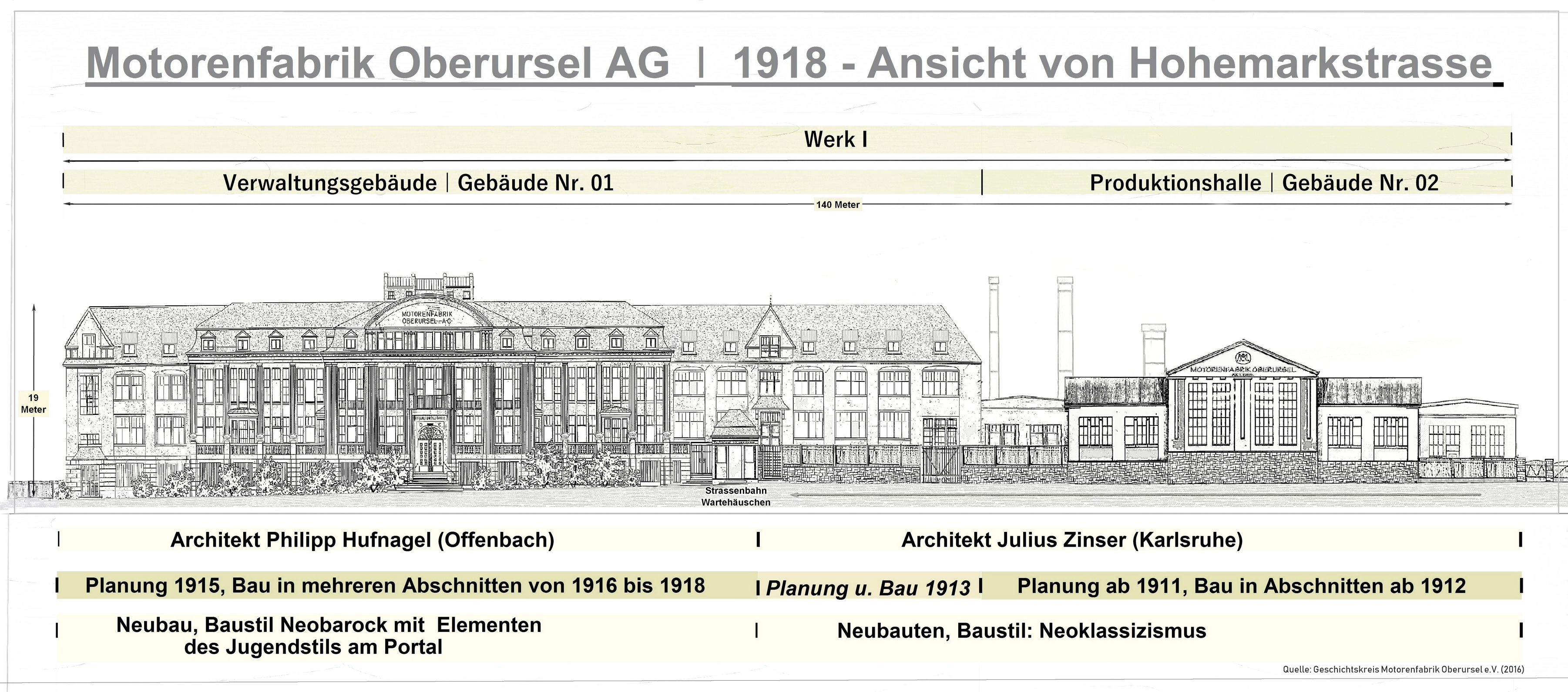 1918 - Die prägenden Bauten der Motorenfabrik Oberursel (mit Beschreibung der Baustile, Bauabschnitten und Architekten)